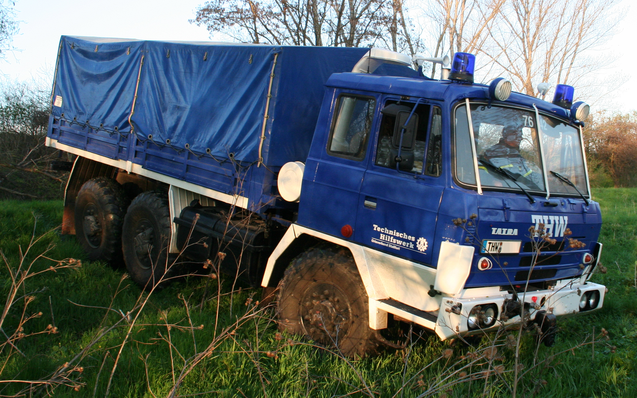 Tatra 815 des THW OV Staßfurt